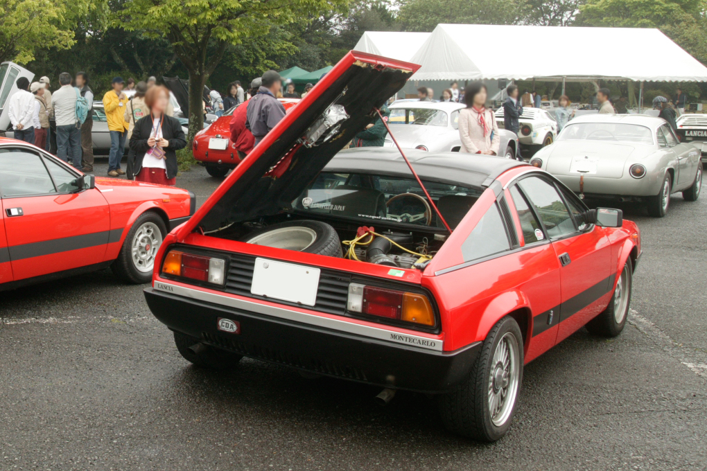 Lancia Monte Carlo Sr.II